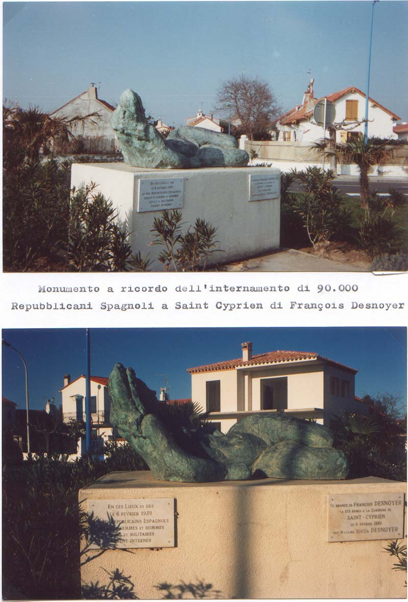 Monumento_a_ricordo_dell'internamento_di_90000_antifascisti_spagnoli_a_Saint_Cyprien_l'opera_e'_di_Françoise_Desnoyer